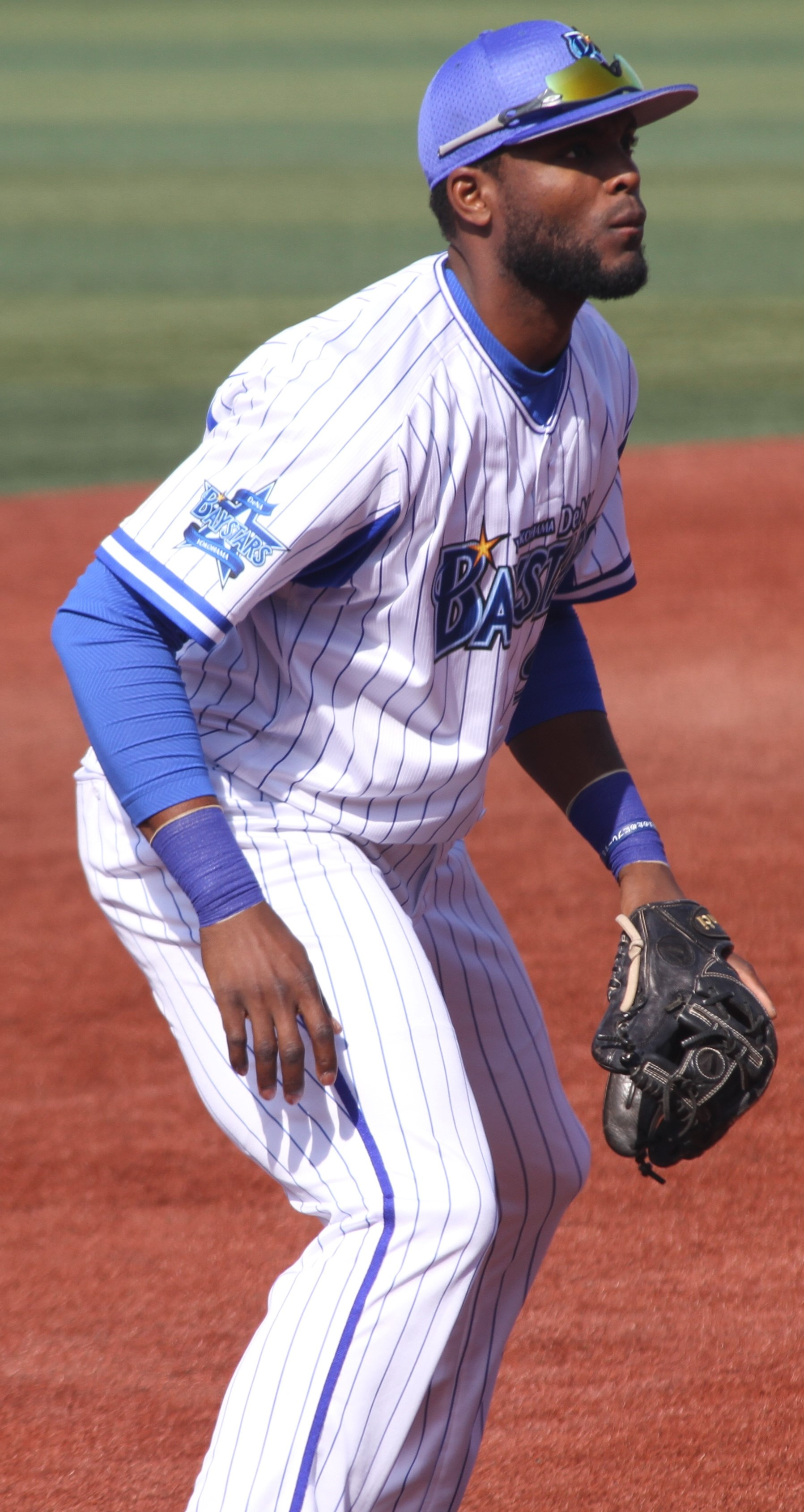 横浜DeNAベイスターズ内野手のアウディ・アレクサンダー・シリアコ・レギサモン。横浜スタジアムにて。